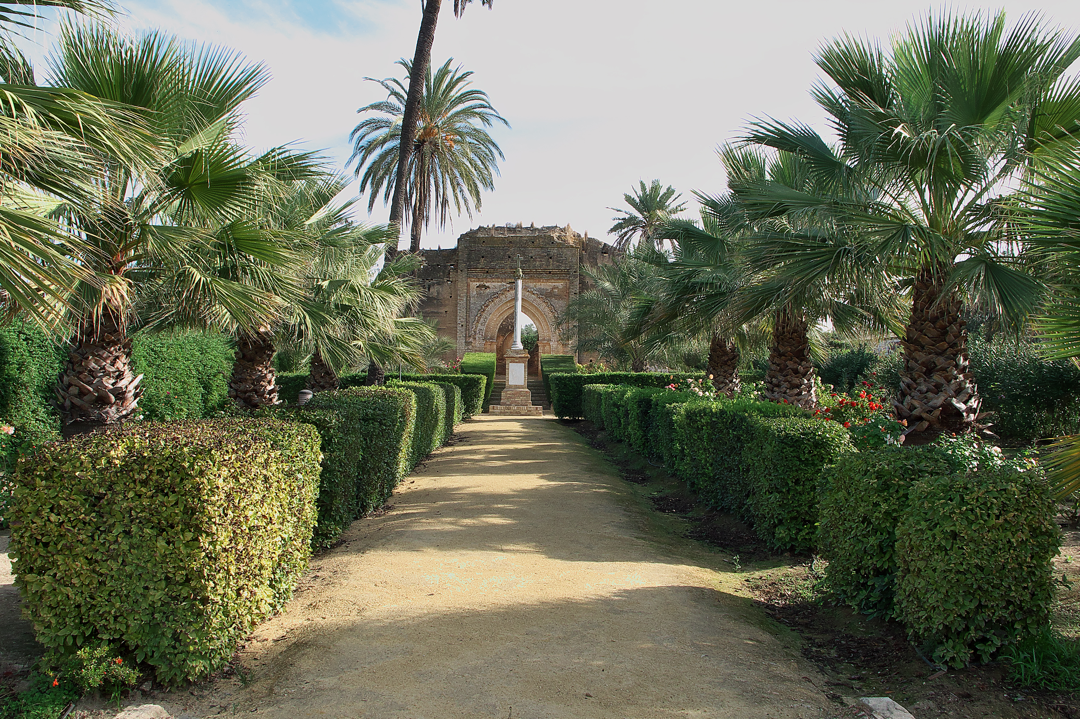 Restos de la ermita gótico-mudéjar (s. XIV)